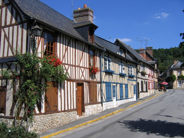 Le Bec Hellouin, Eure, Haute Normandie, France